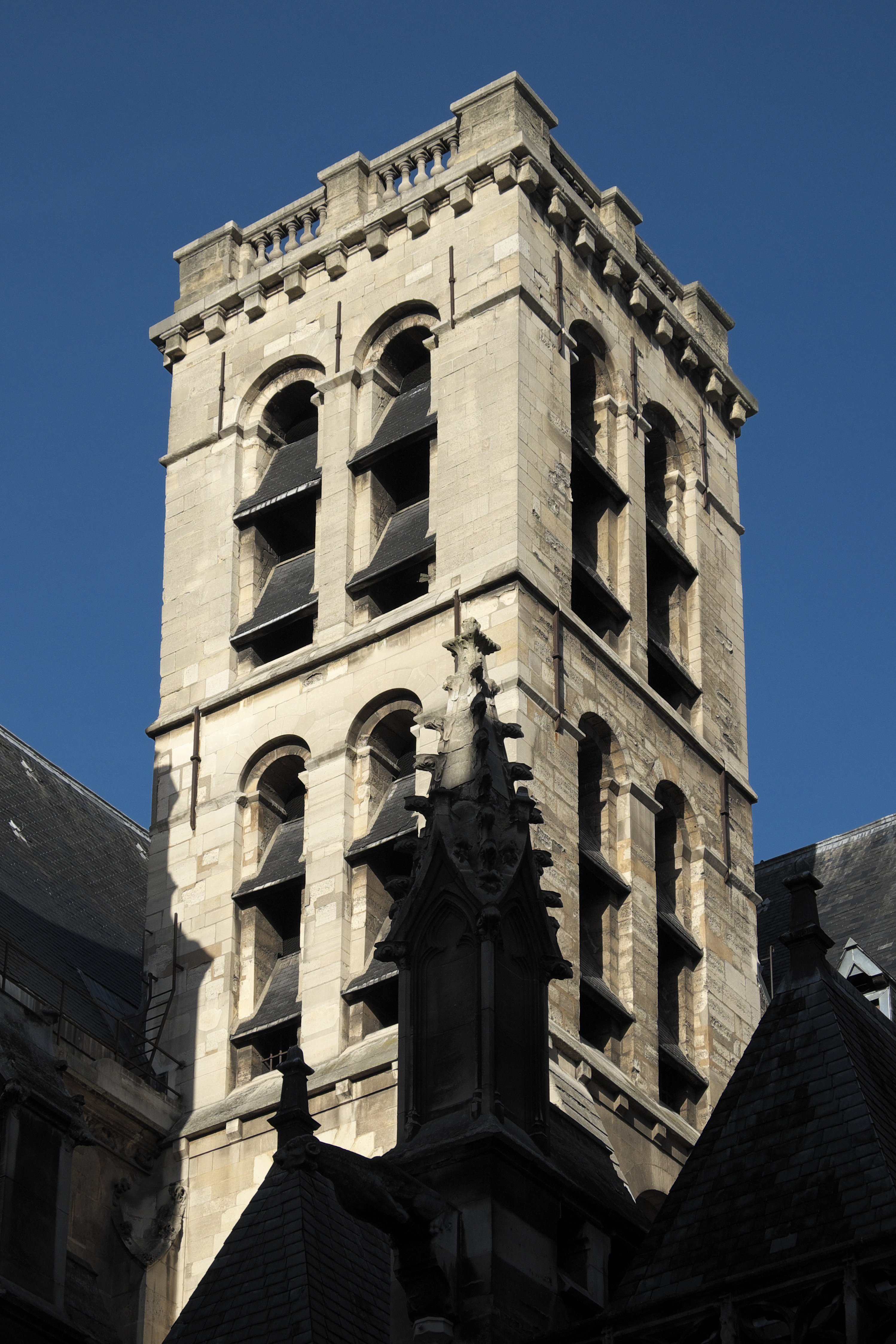 Katholische Pfarrkirche St-Germain-l’Auxerrois im 1. Arrondisseement in Paris, Glockenturm mit romanischem Unterbau